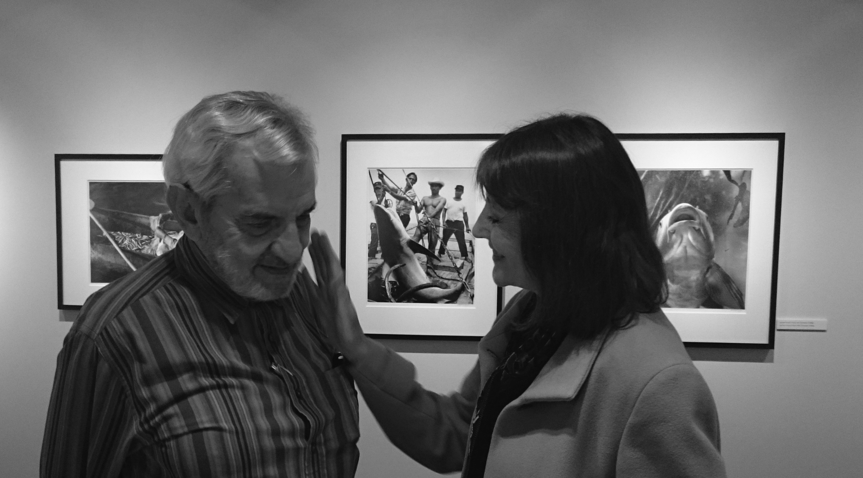 Rodrigo Moya y Susan Flaherty en la exposición "Photography and Conscience / Fotografía y conciencia". Wittliff Collection, Texas State University, San Marcos, Texas, 14 de noviembre de 2015.